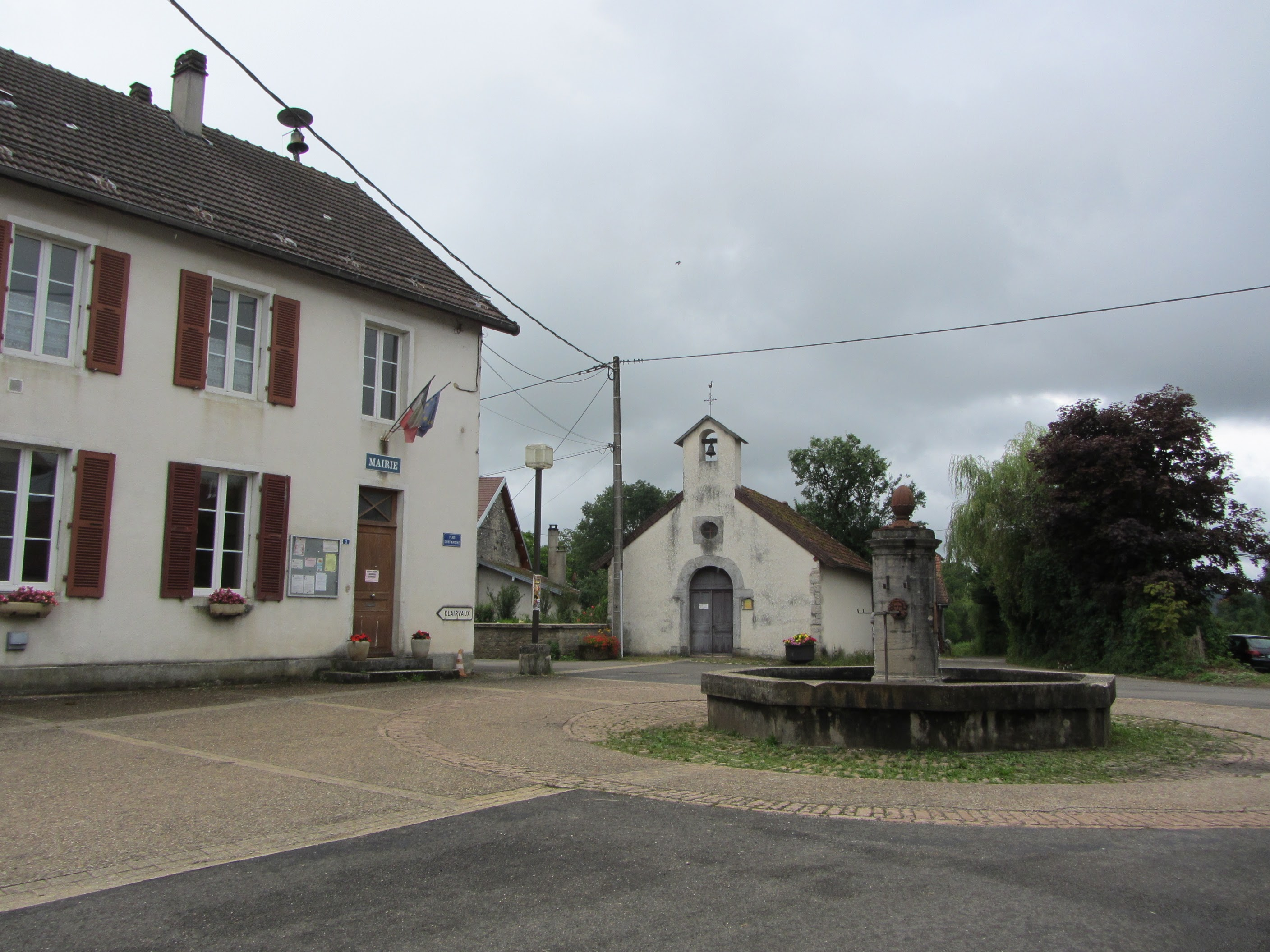 Charezier